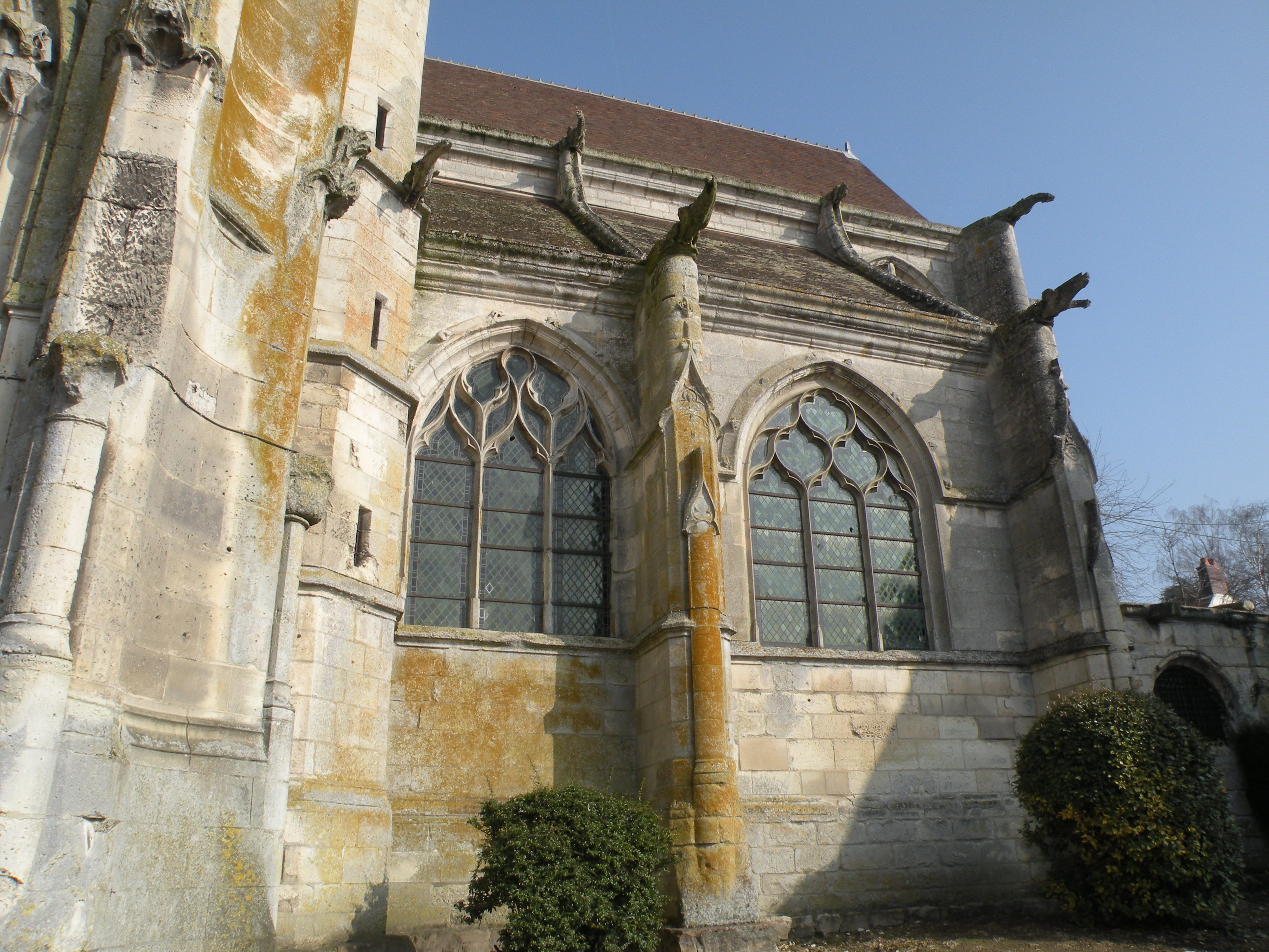 Église Saint-Pierre-et-Saint-Paul de Baron